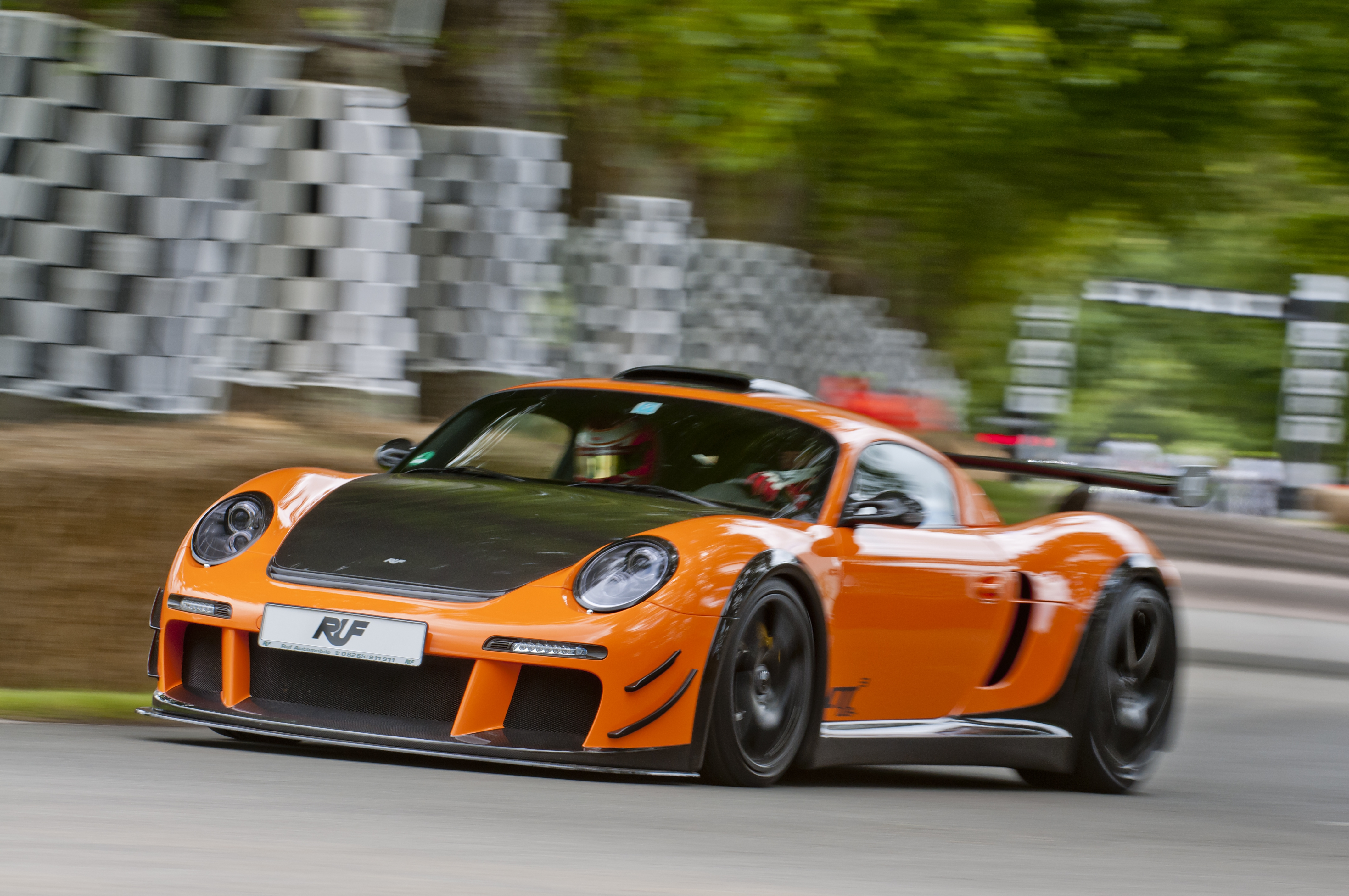 RUF CTR 3 beim Goodwood Festival Of Speed 2012 Foto von Johny Tipler